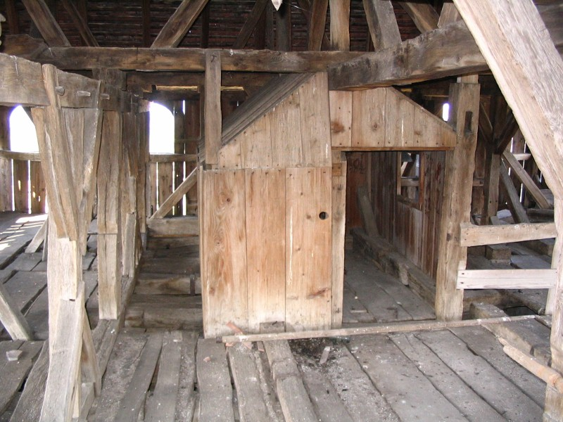 Uhrenhaus der Kirchenburg Bekokten